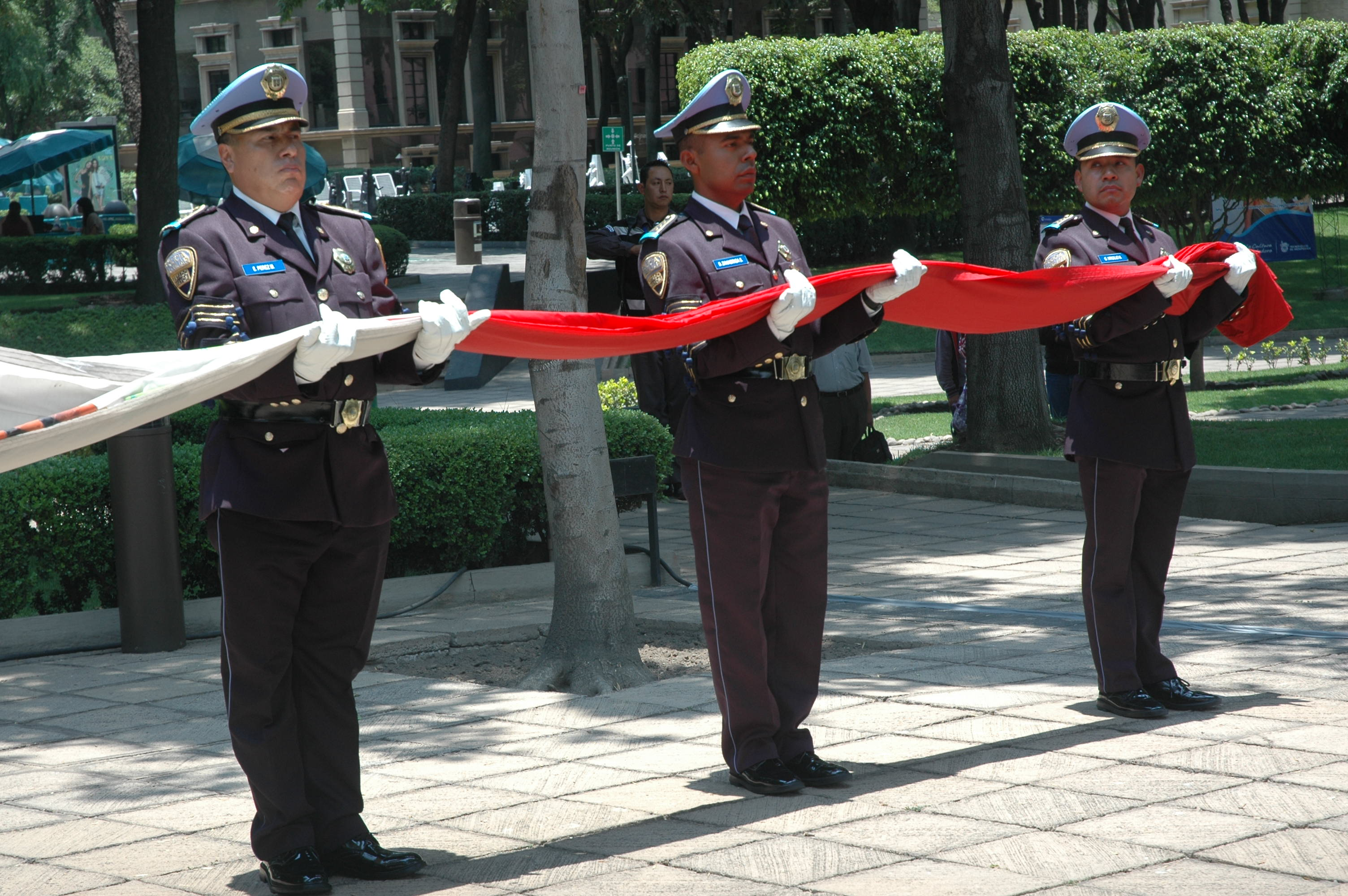 Levantar la bandera mexicana en la ceremonia de firmar el Convenio de Colaboración y Vinculación Ciudadana para la Creación de Corredores Seguros Universitarios en ITESM Campus Ciudad de México